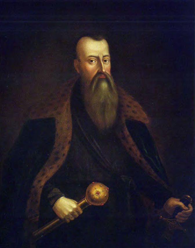 Беларуская (тарашкевіца): Партрэт Радзівіла Осьцікавіча (Radzivił Ościkavič). Копія з больш раньняга твору